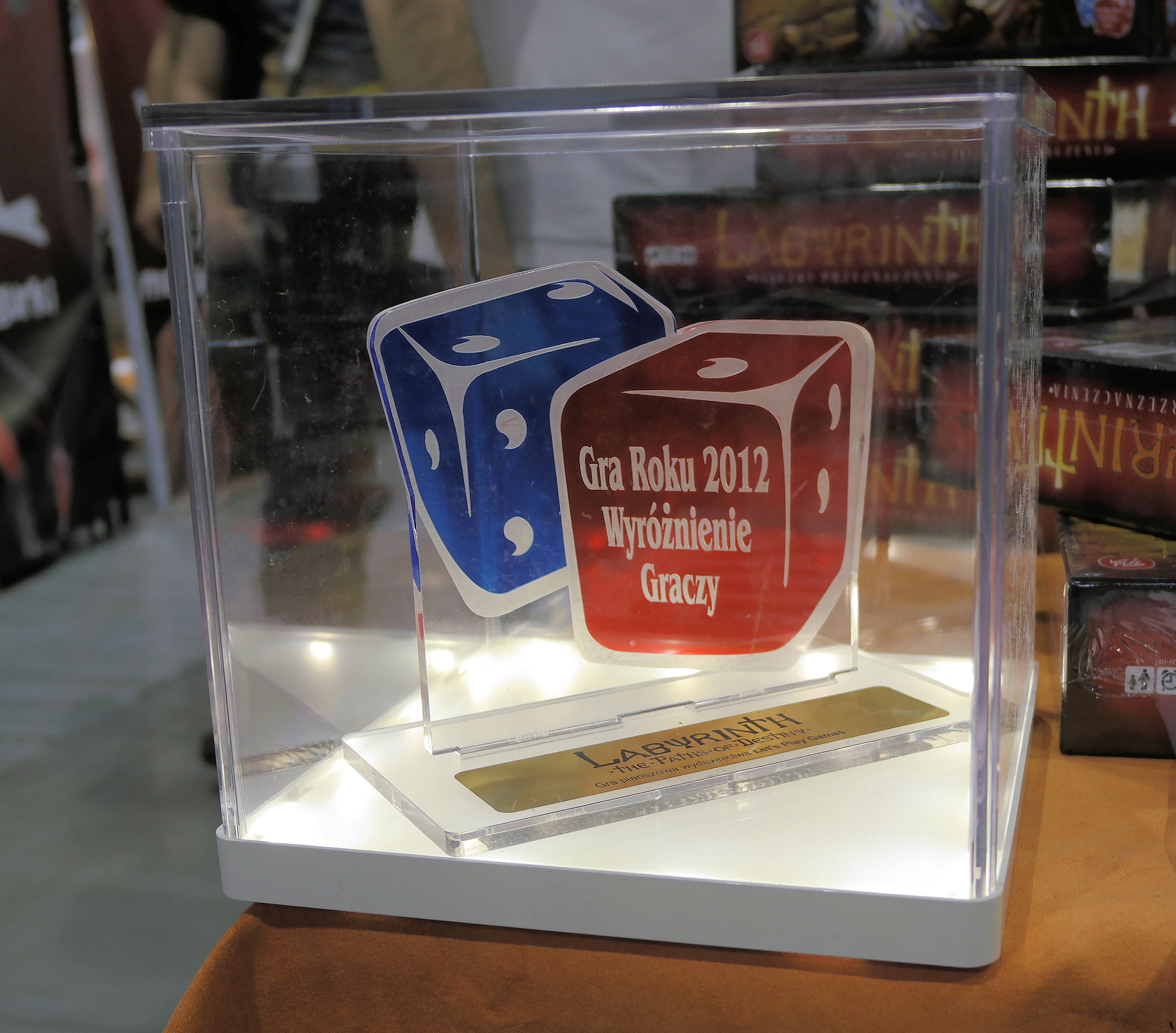 Gra Roku, Pyrkon, Poznań 2015